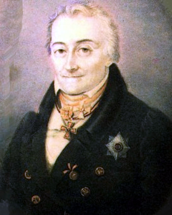 Ferdinand Justus Christian Loder (1753-1832) deutscher Mediziner